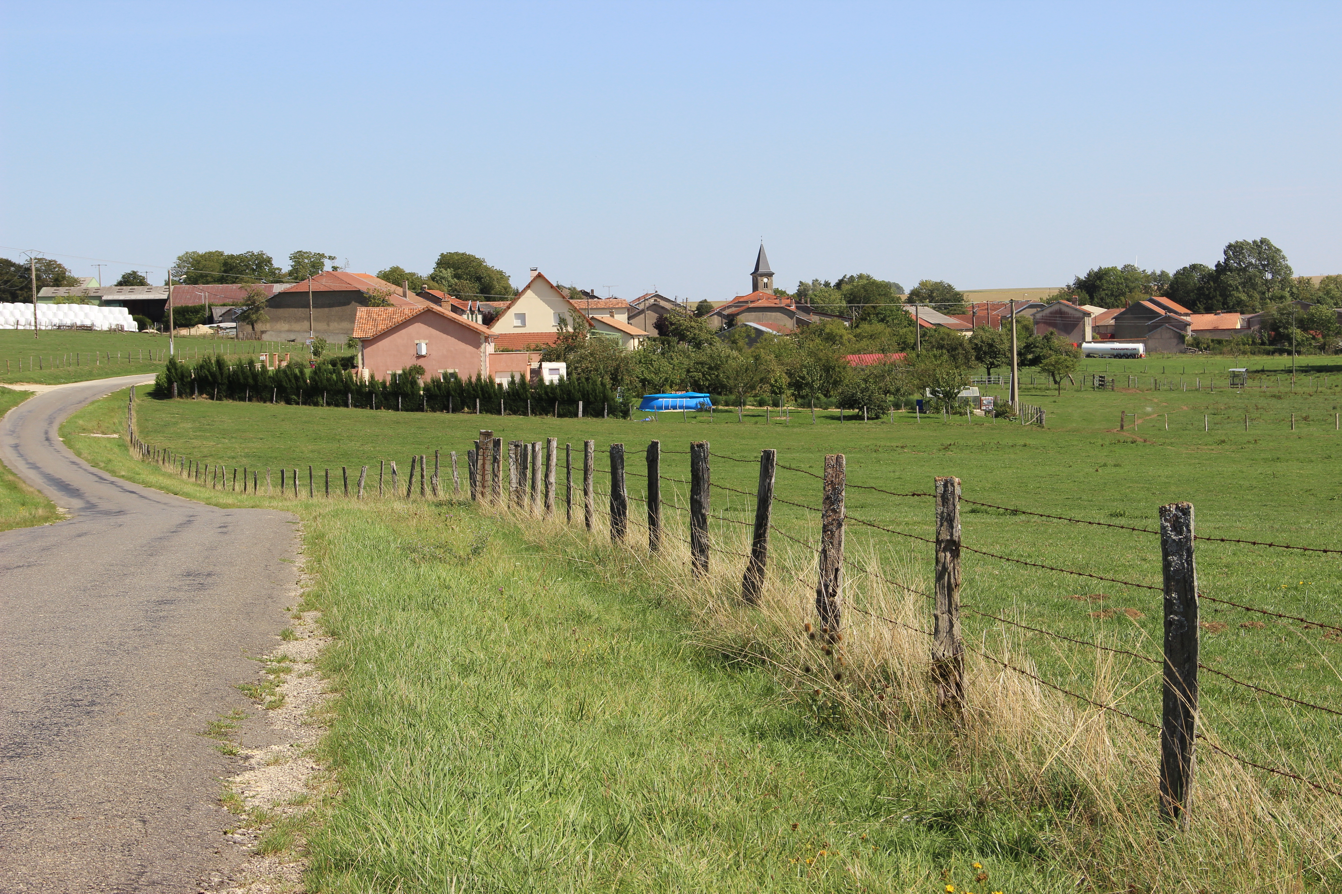 Aperçu du village de Pretz en arrivant de Vaubecourt